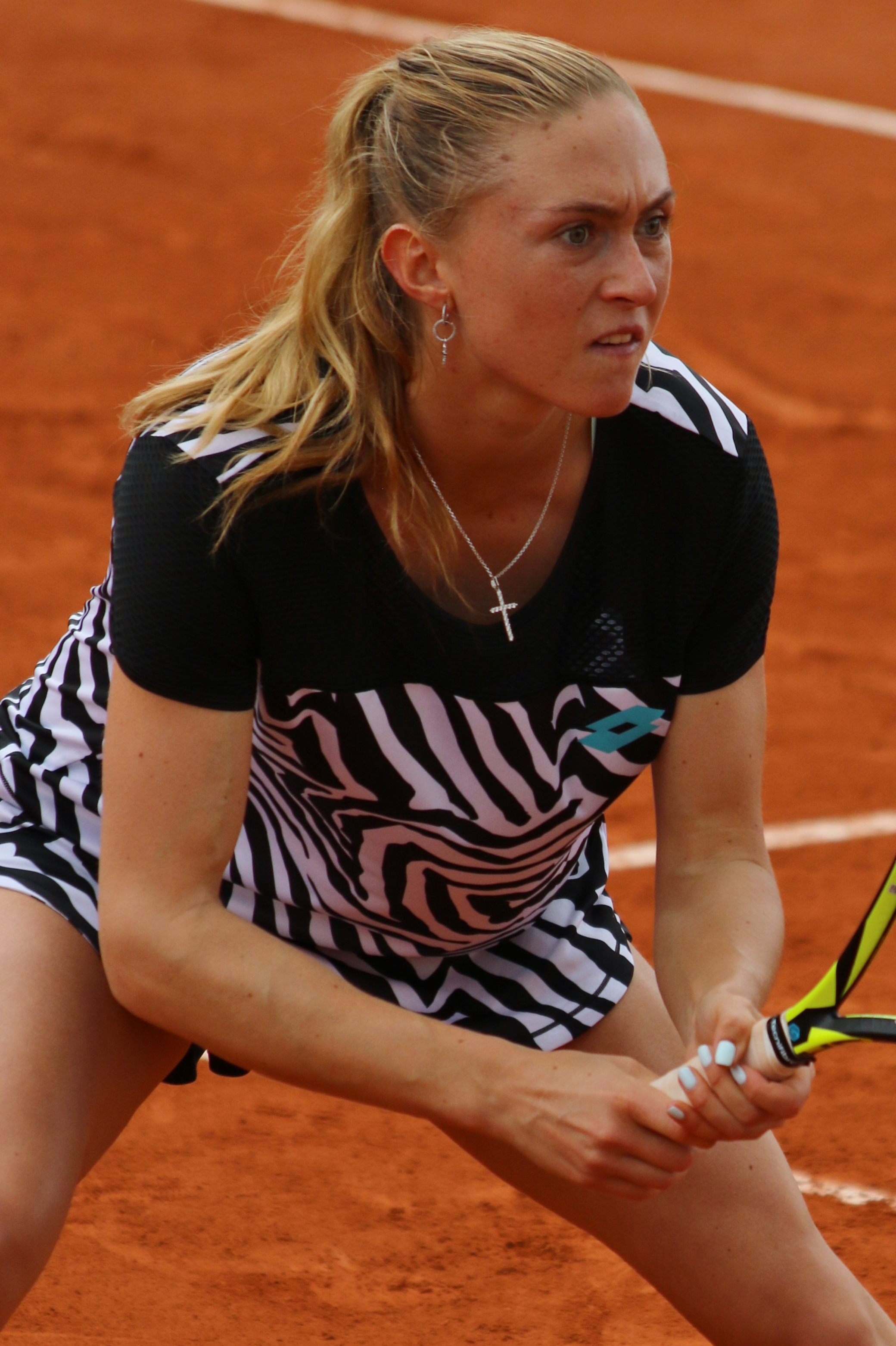 Sasnovich RG19